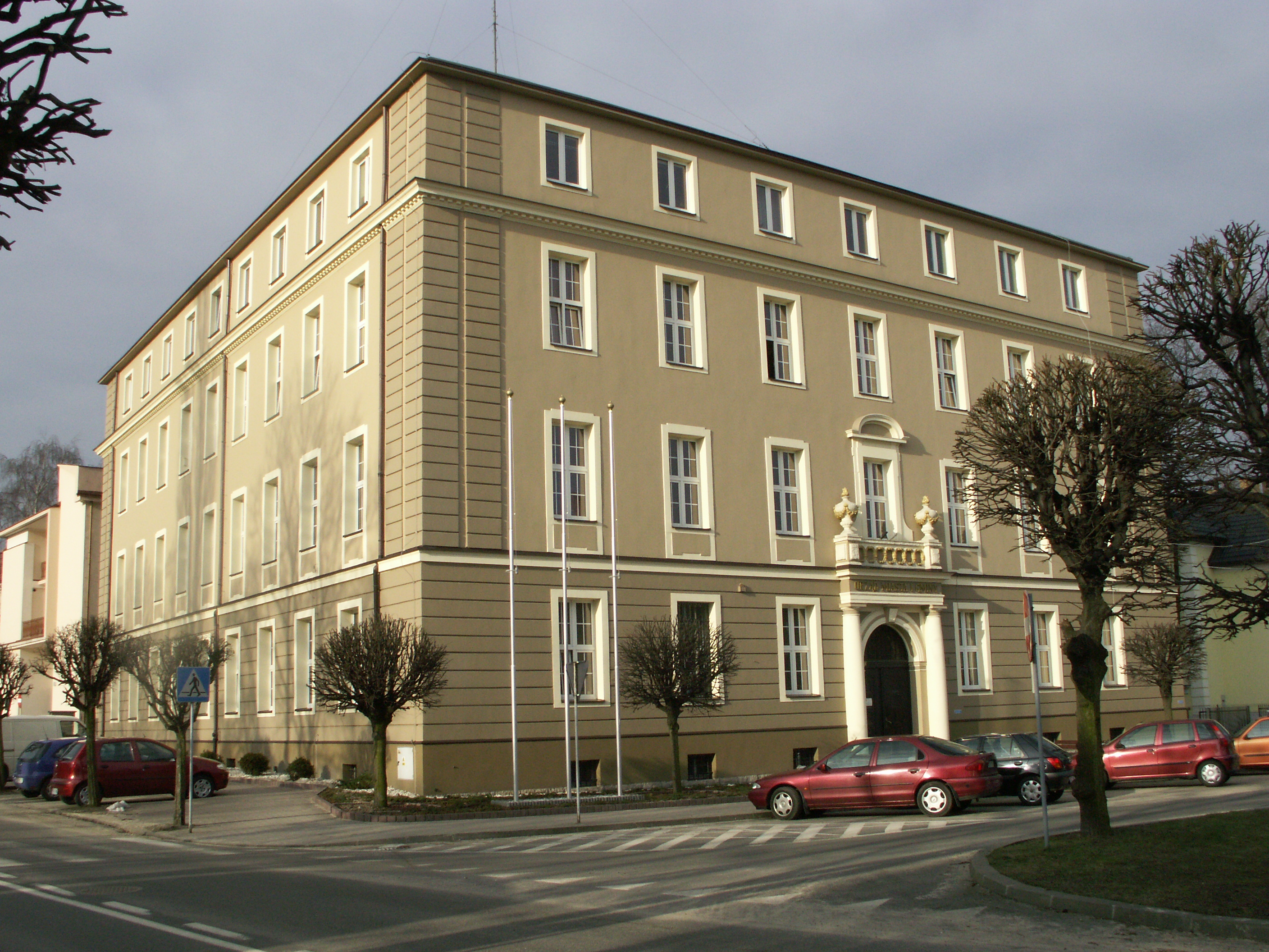 Ostrzeszów, ul. Zamkowa 31 - Urząd Miasta i Gminy